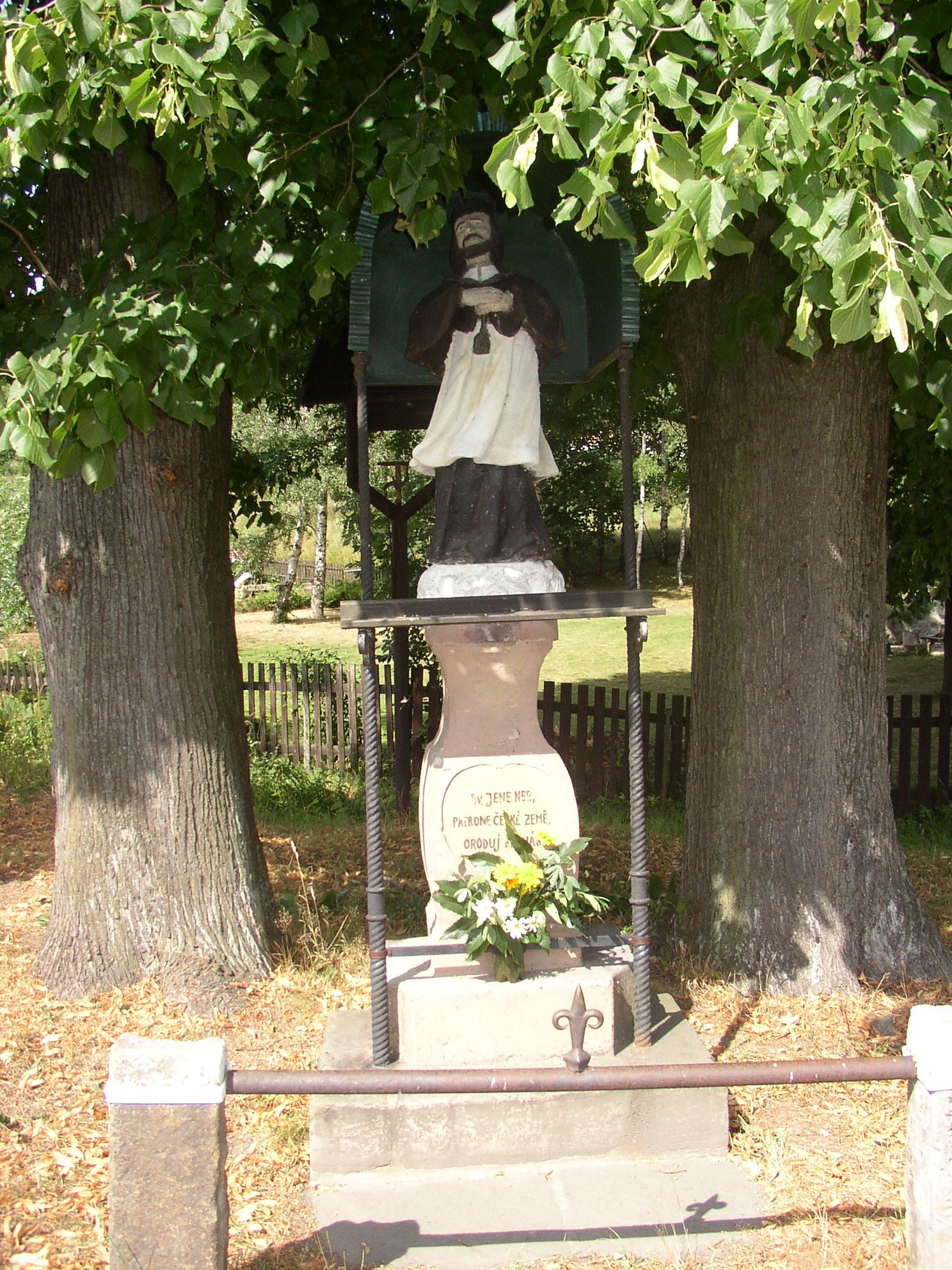 Socha svatého Jana Nepomuckého z roku 1728, osada Rozhled, Jiřetín pod Jedlovou, okres Děčín, Česká republika